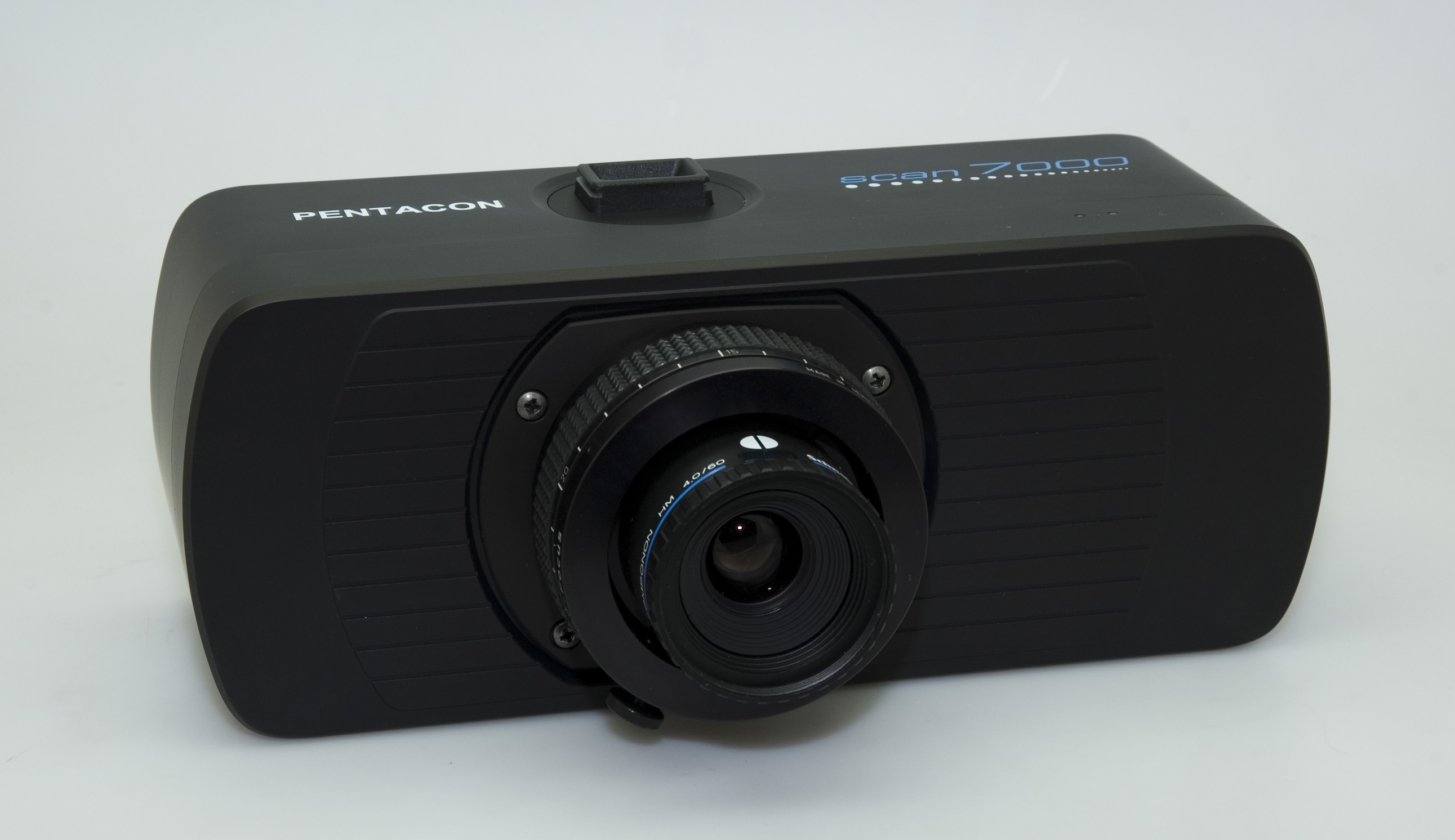 Pentacon Scanner-Kamera Scan 7000